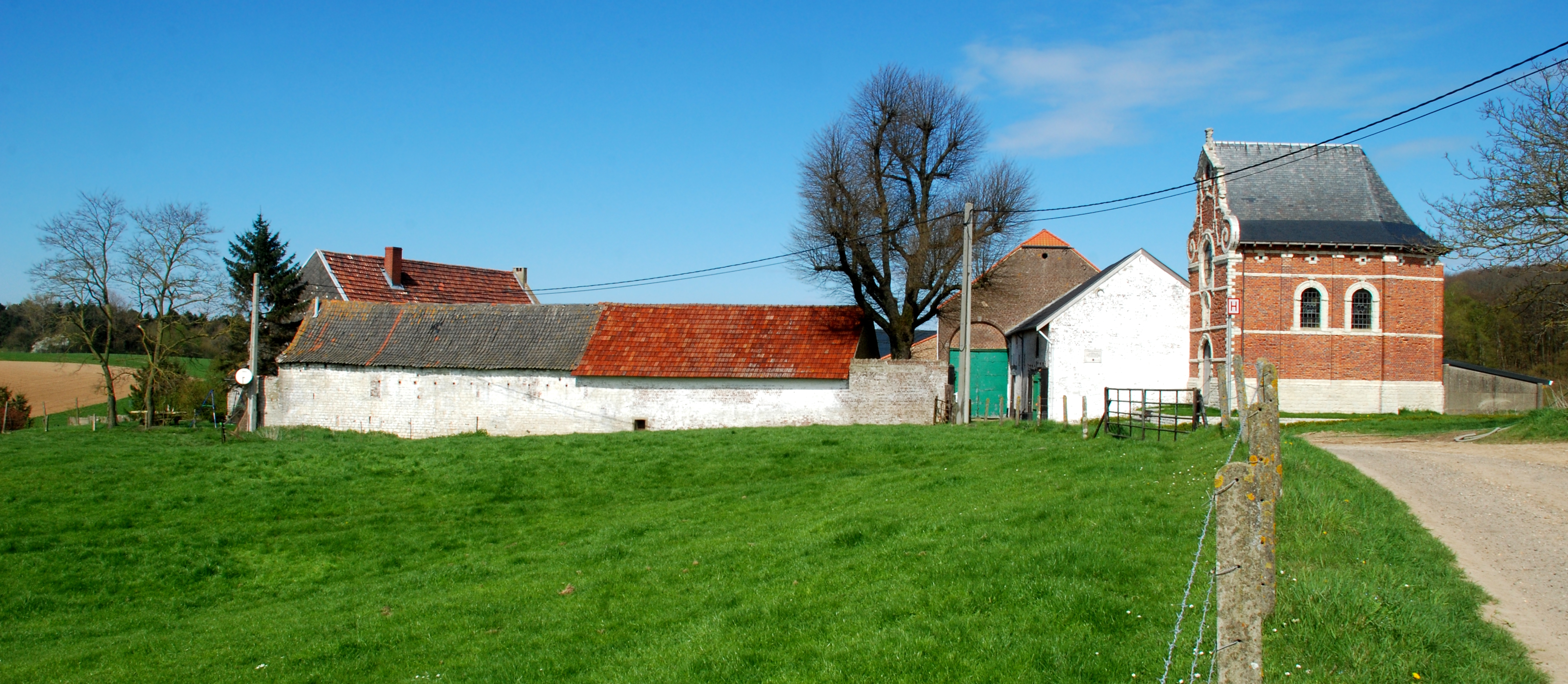 Belgique - Brabant wallon - Genappe - Ferme du Chantelet